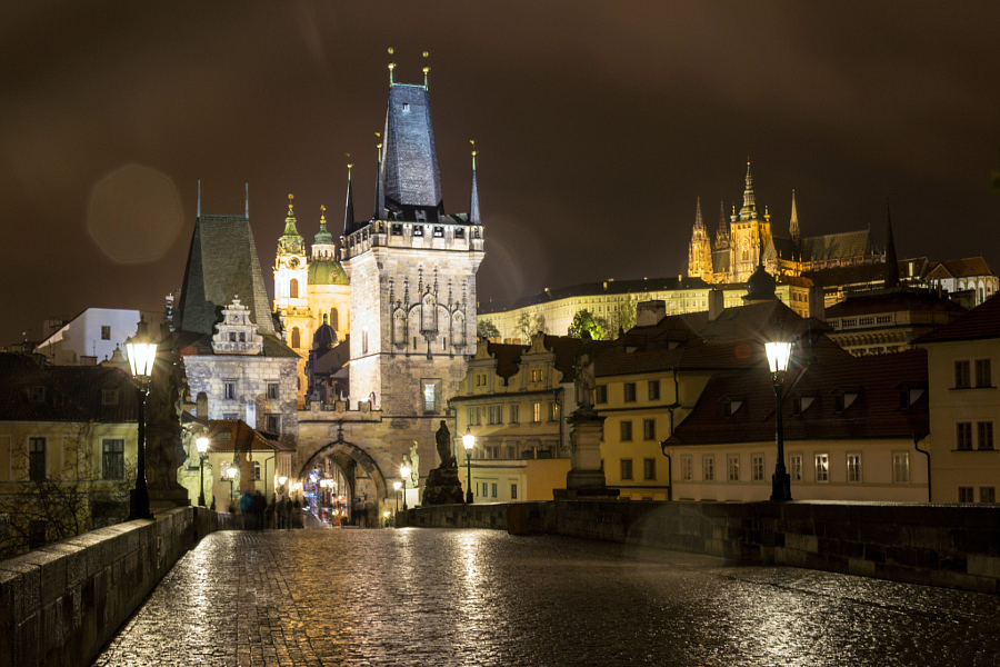 Карлов мост в Праге